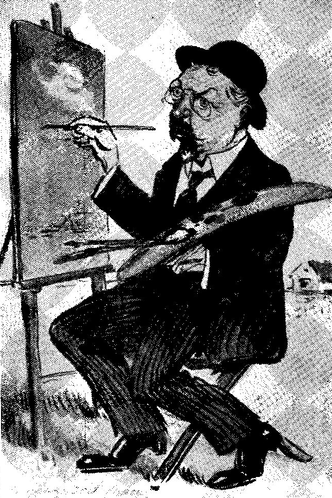 NP-Gaina - Pictorul Gheorghe Petrascu